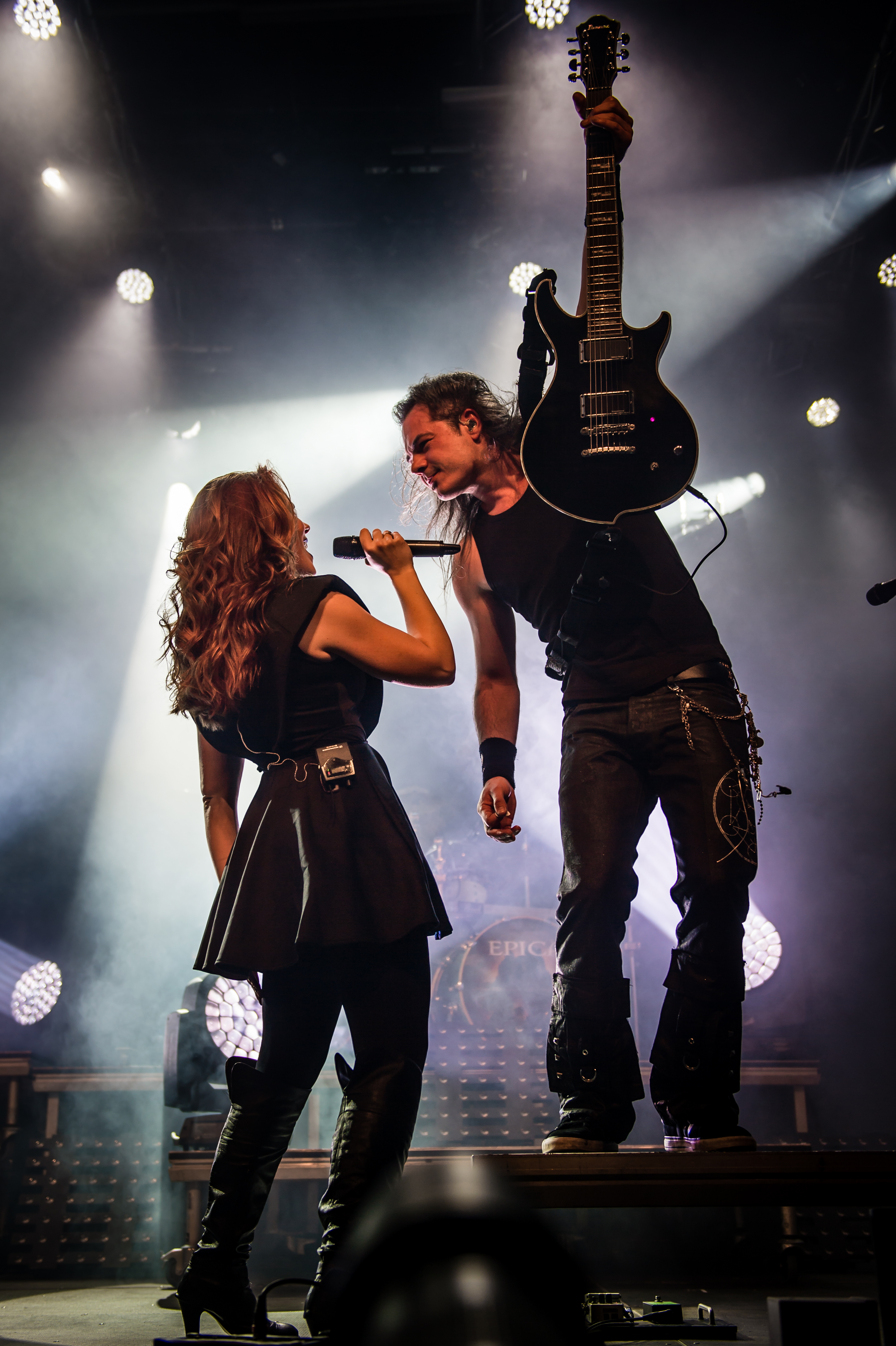 'Epica - Epic Metal Fest - Eindhoven'